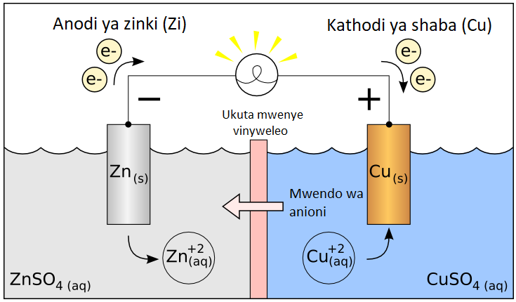 Kiswahili: Seli ya Galvani inatumia nishati ya kikemia kuzalisha umeme. Ni seli ya kielektrokemia.